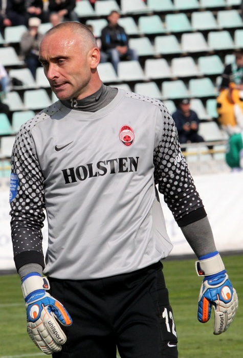 Виталий Постранский